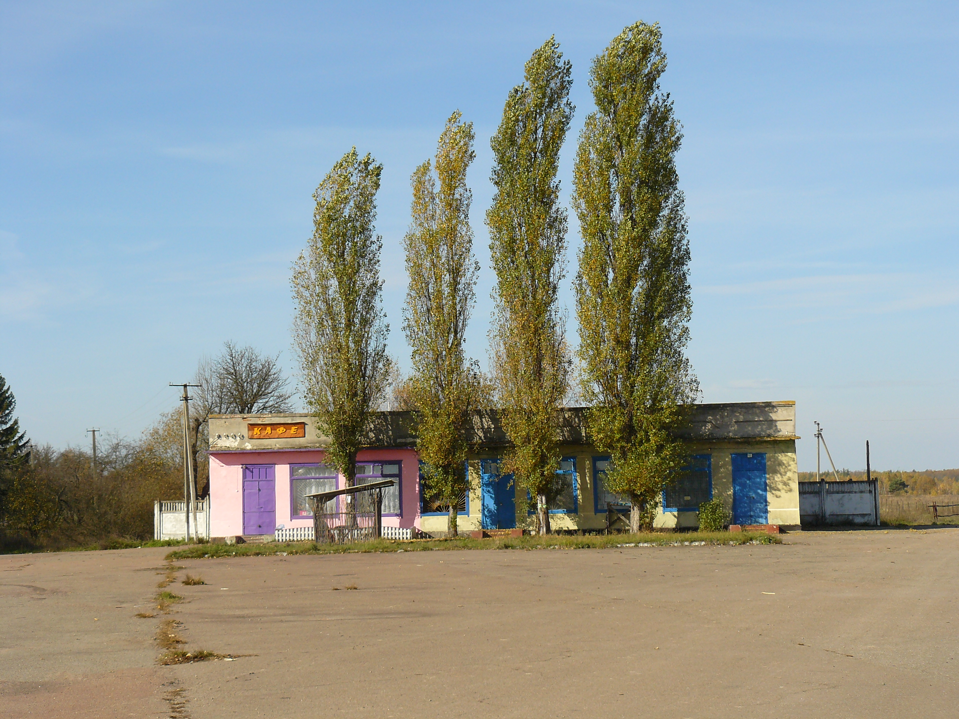 Кафе у Жупанівці